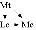 Problème synoptique: Hypothèse de Griesbach Auteur: jyp